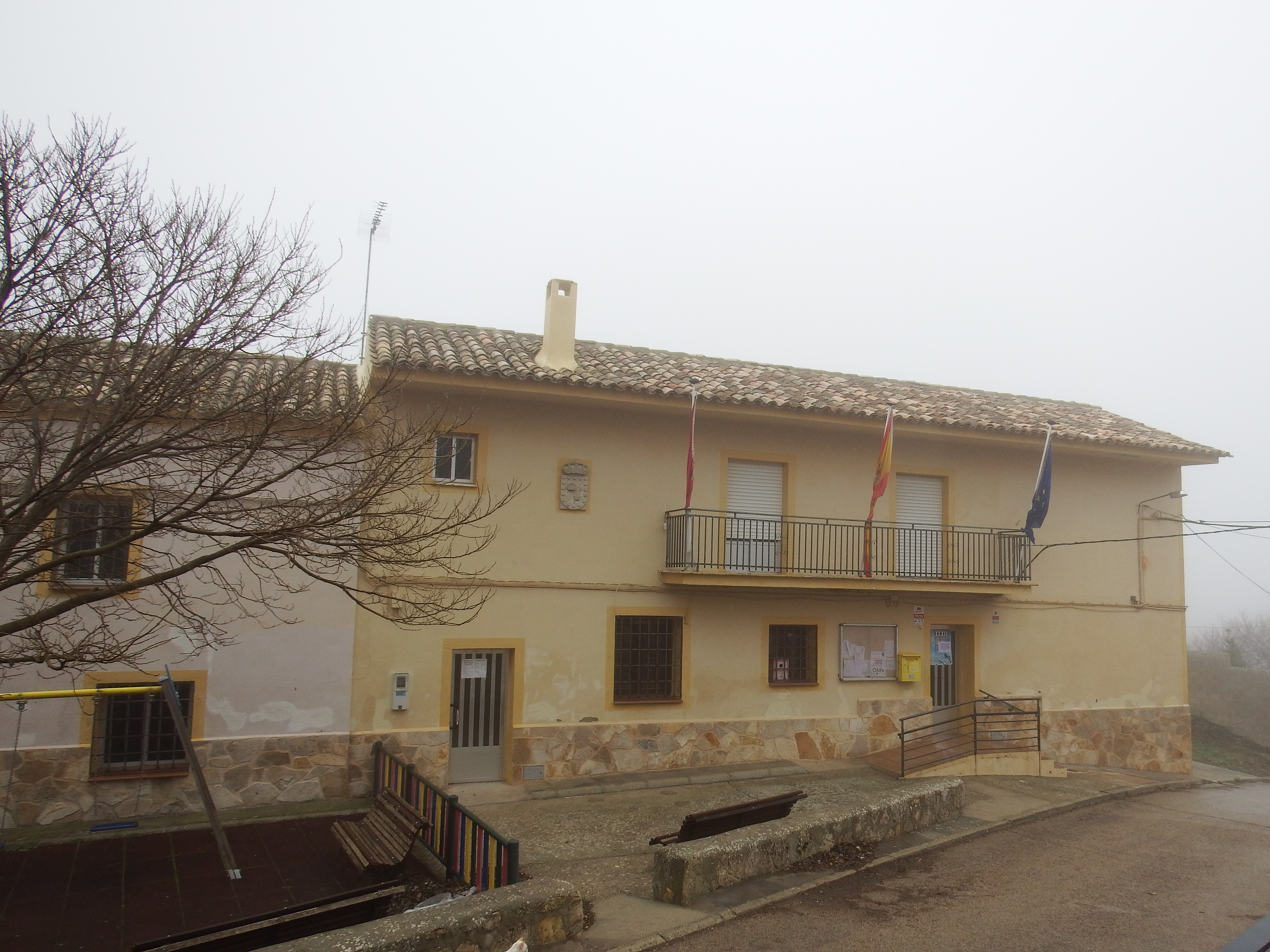 Ayuntamiento